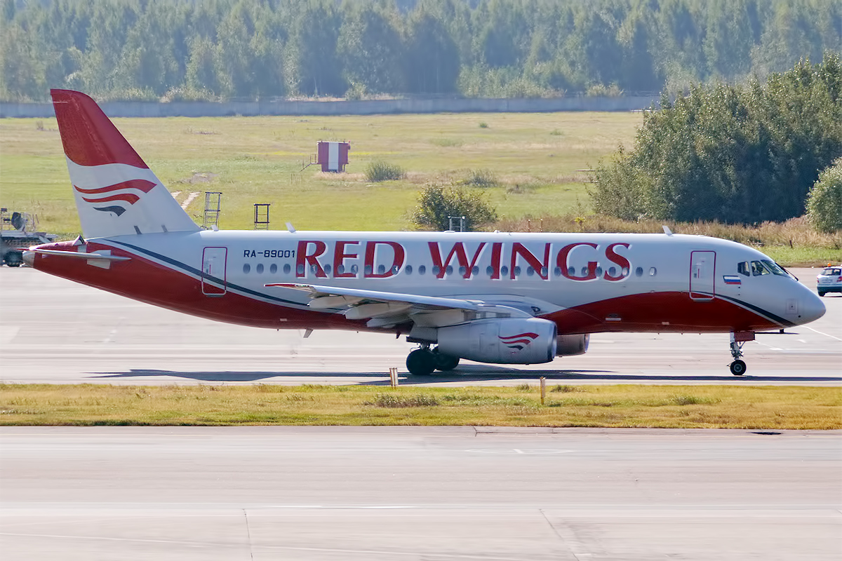 Red Wings, RA-89001, Sukhoi Superjet 100-95B